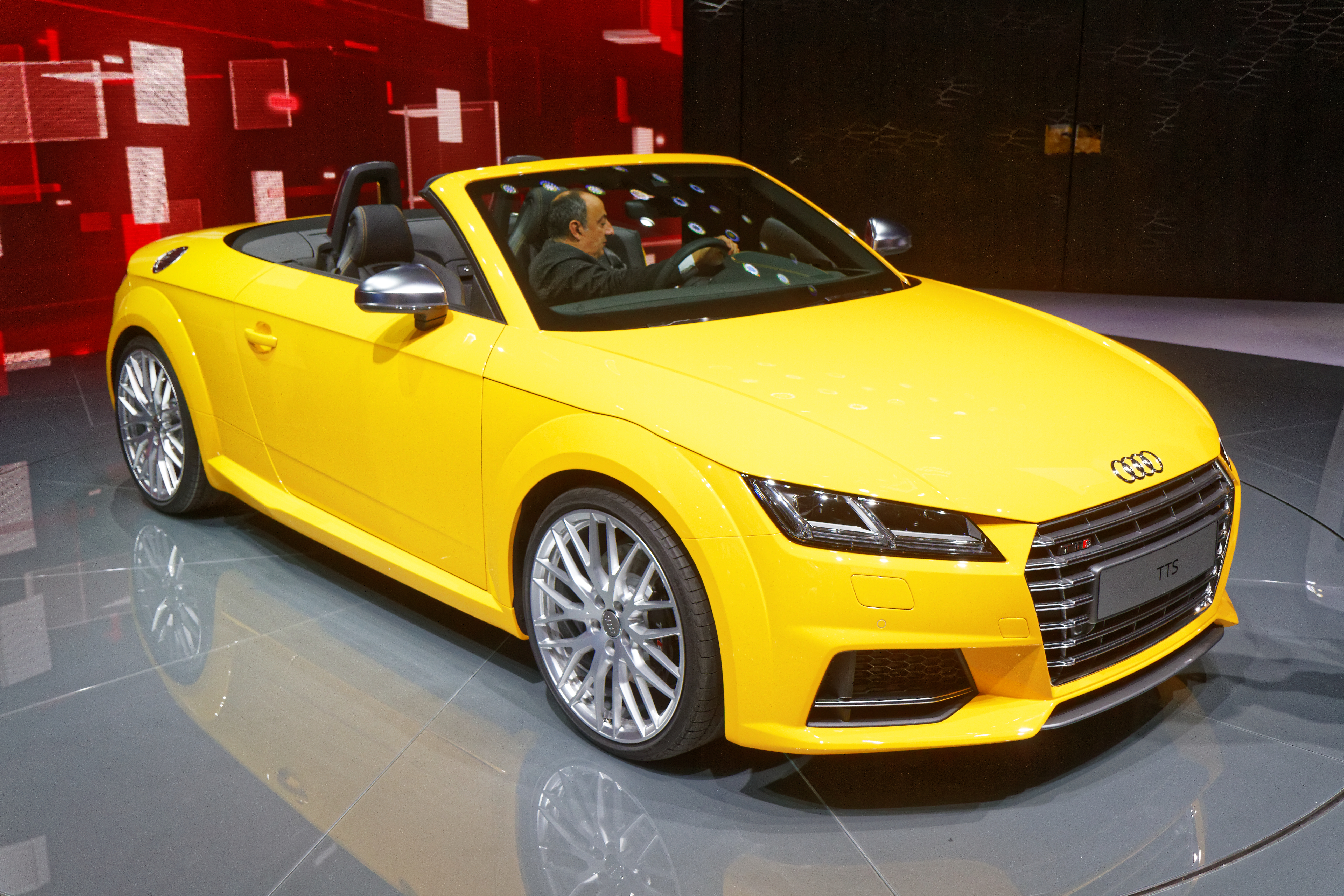 Une Audi TTS présentée lors du mondial de l'automobile de Paris 2014.